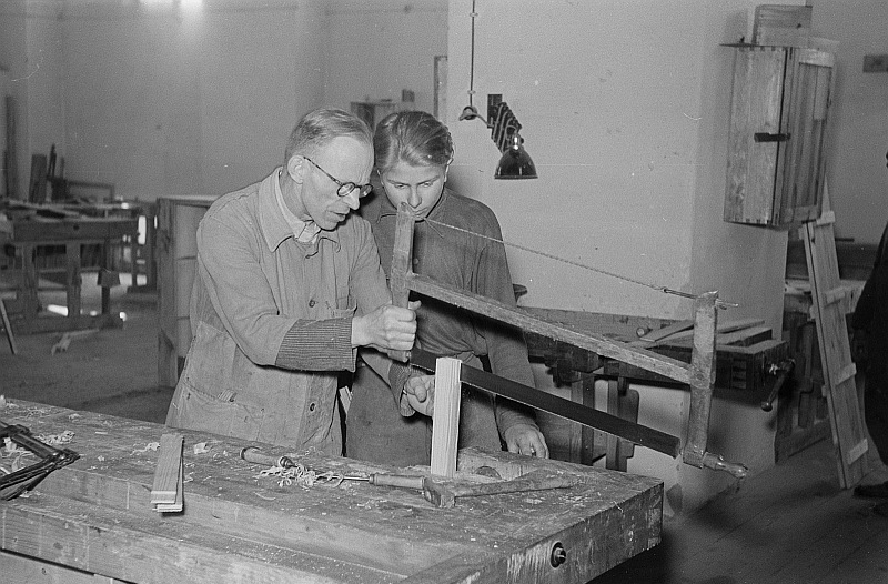 Original image description from the Deutsche Fotothek Porträt von Arbeitern beim Sägen